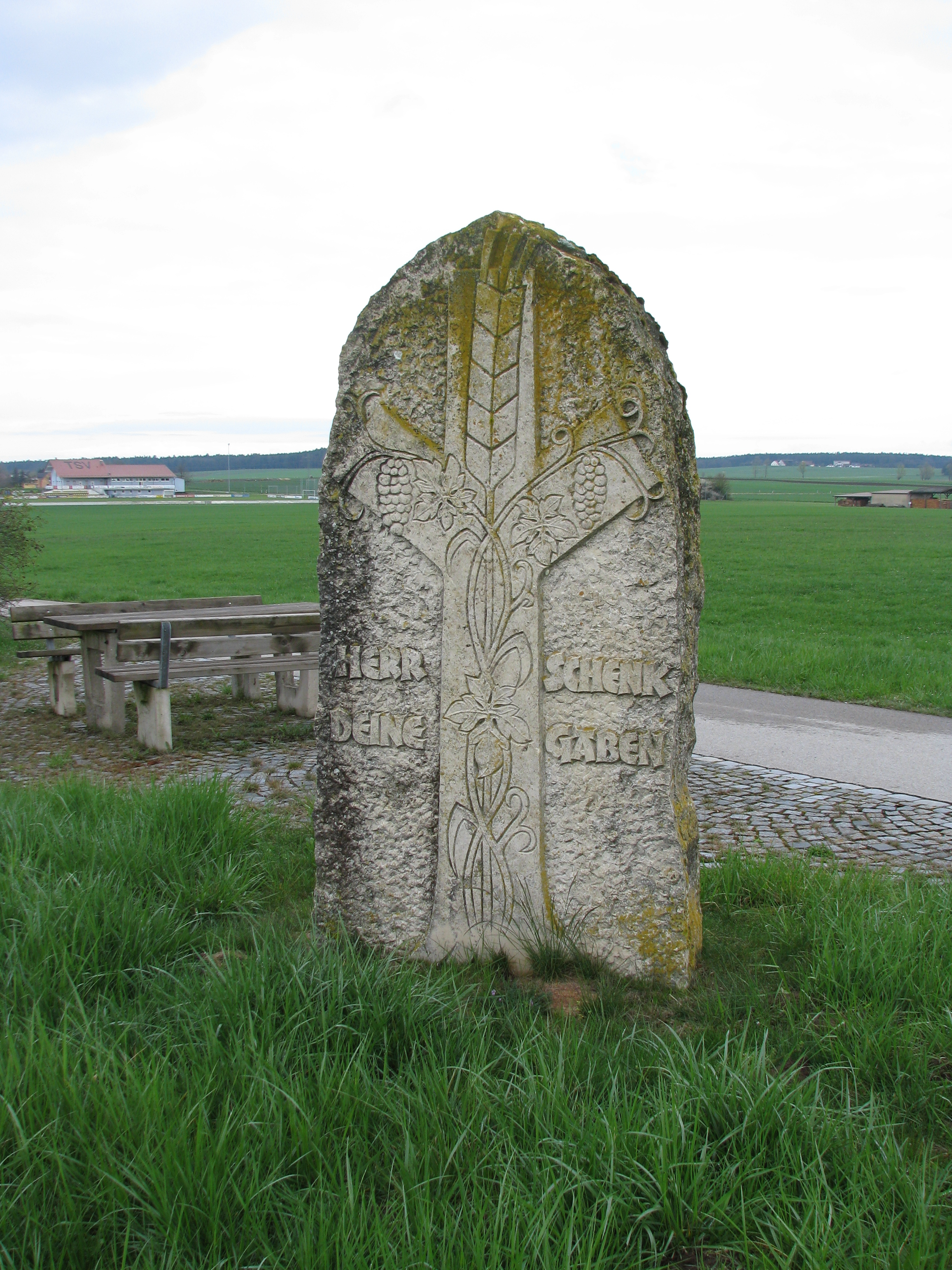 Mörsdorf, Ortsteil von Freystadt im Landkreis Neumarkt in der Oberpfalz, Bayern, Gedenkstein an die Flurbereinigung